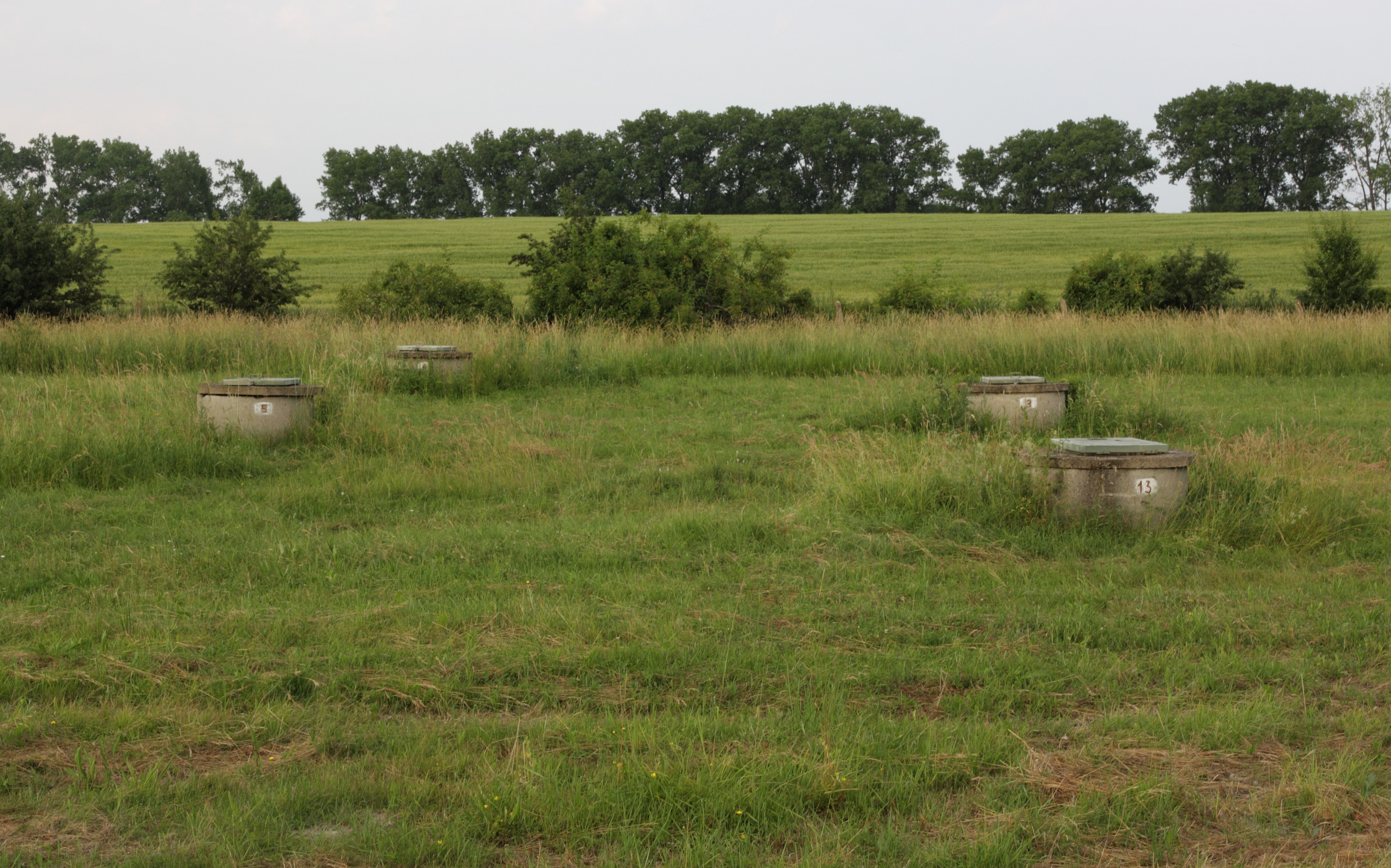 Těžební pole Kalužiny - studny.